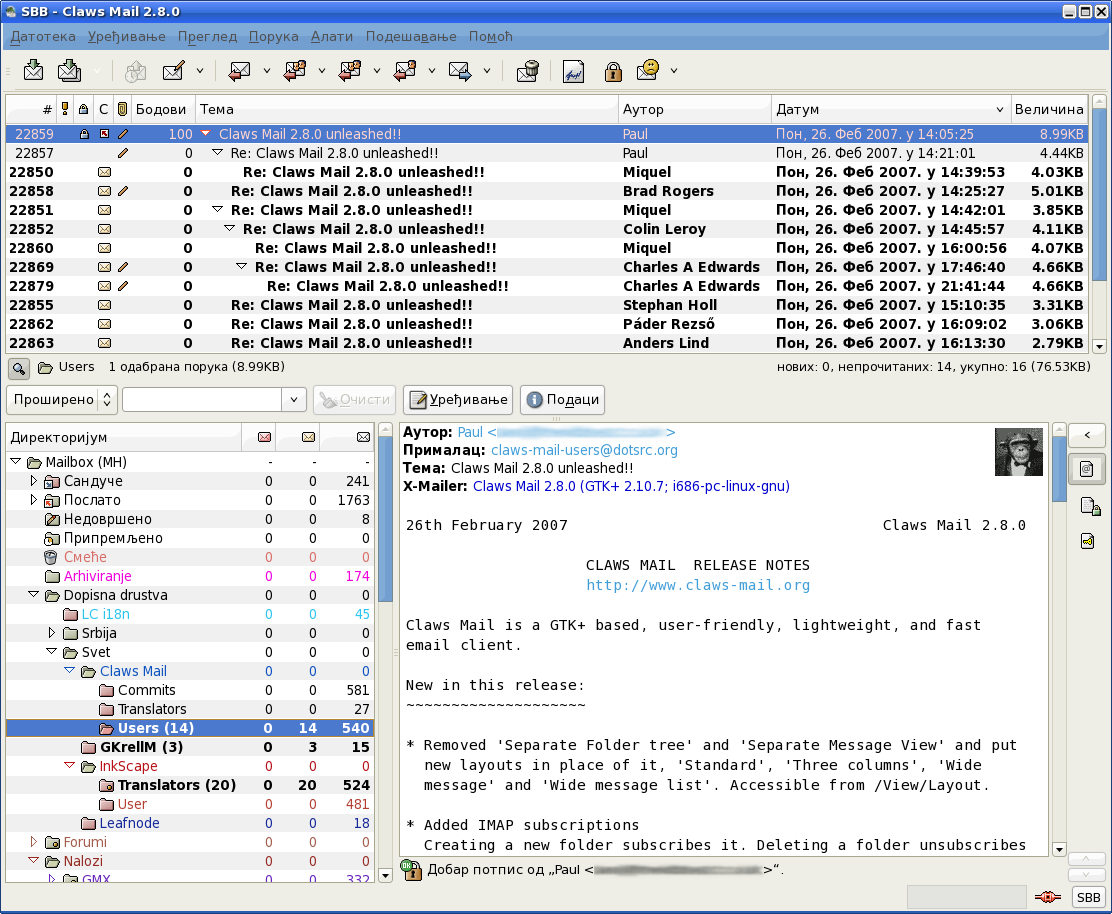 Claws Mail 2.8.0 (Serbian)